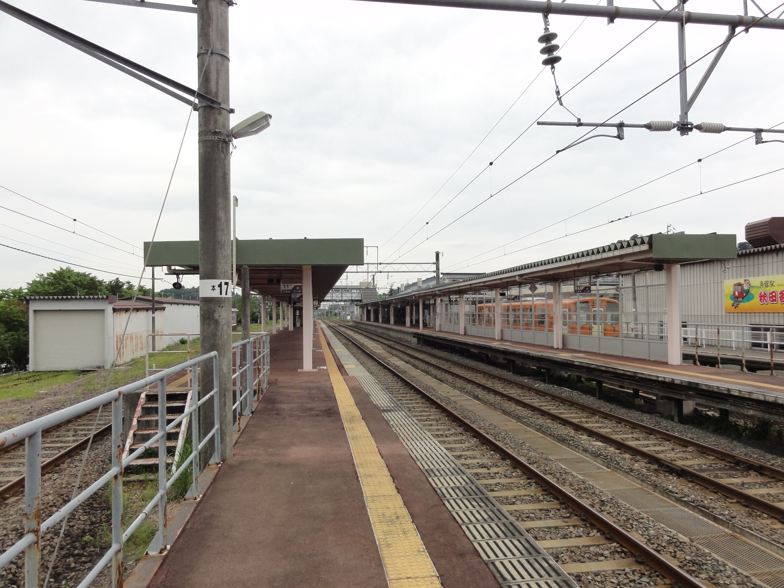 角館駅ホーム